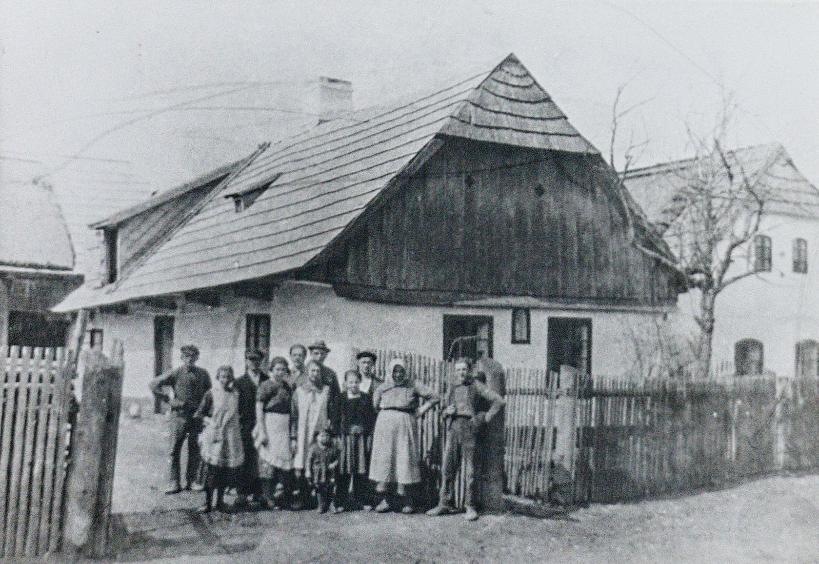 Číslo popsné 47, U Krejčů